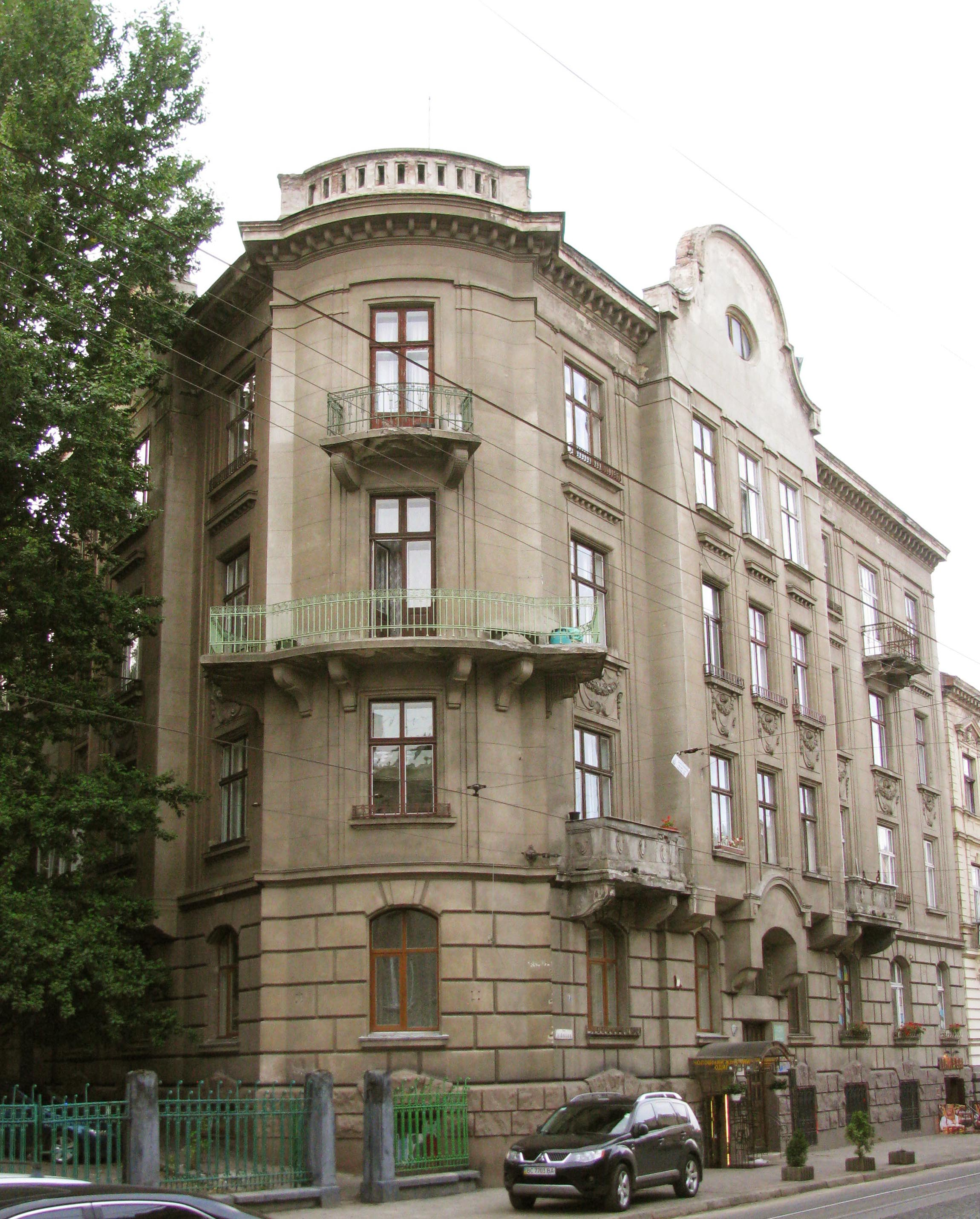 Будинок № 46 на Вулиця Франка у Львові.